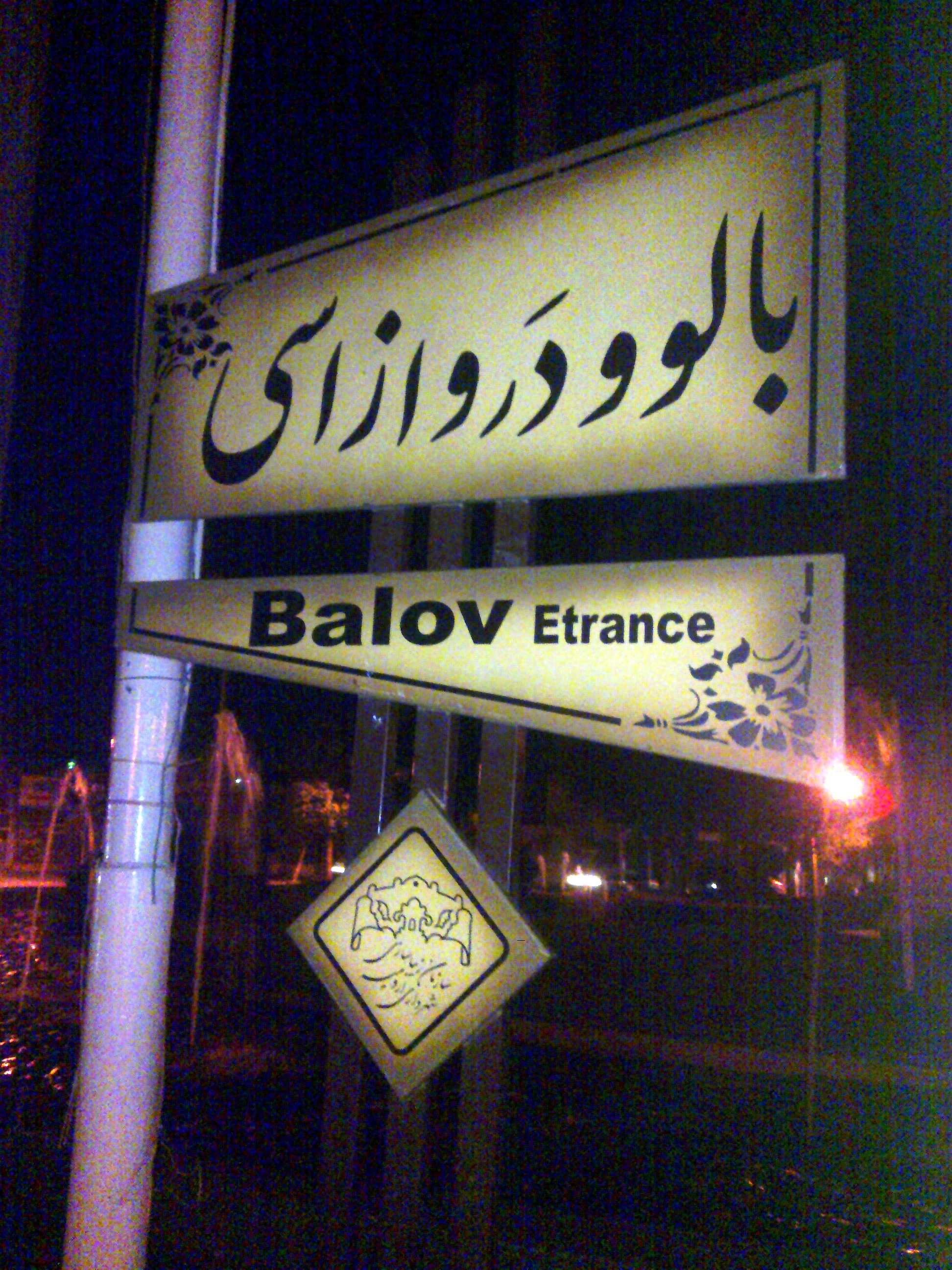 تۆرکجه: بلدیه الیله وورولان تابلو بالوو دروازاسینین یئری - اورمو شهدا میدانی